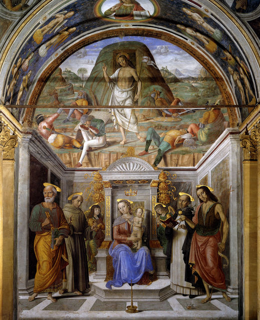 Sacra conversación y Resurrección, Capilla Tirani, Cagli